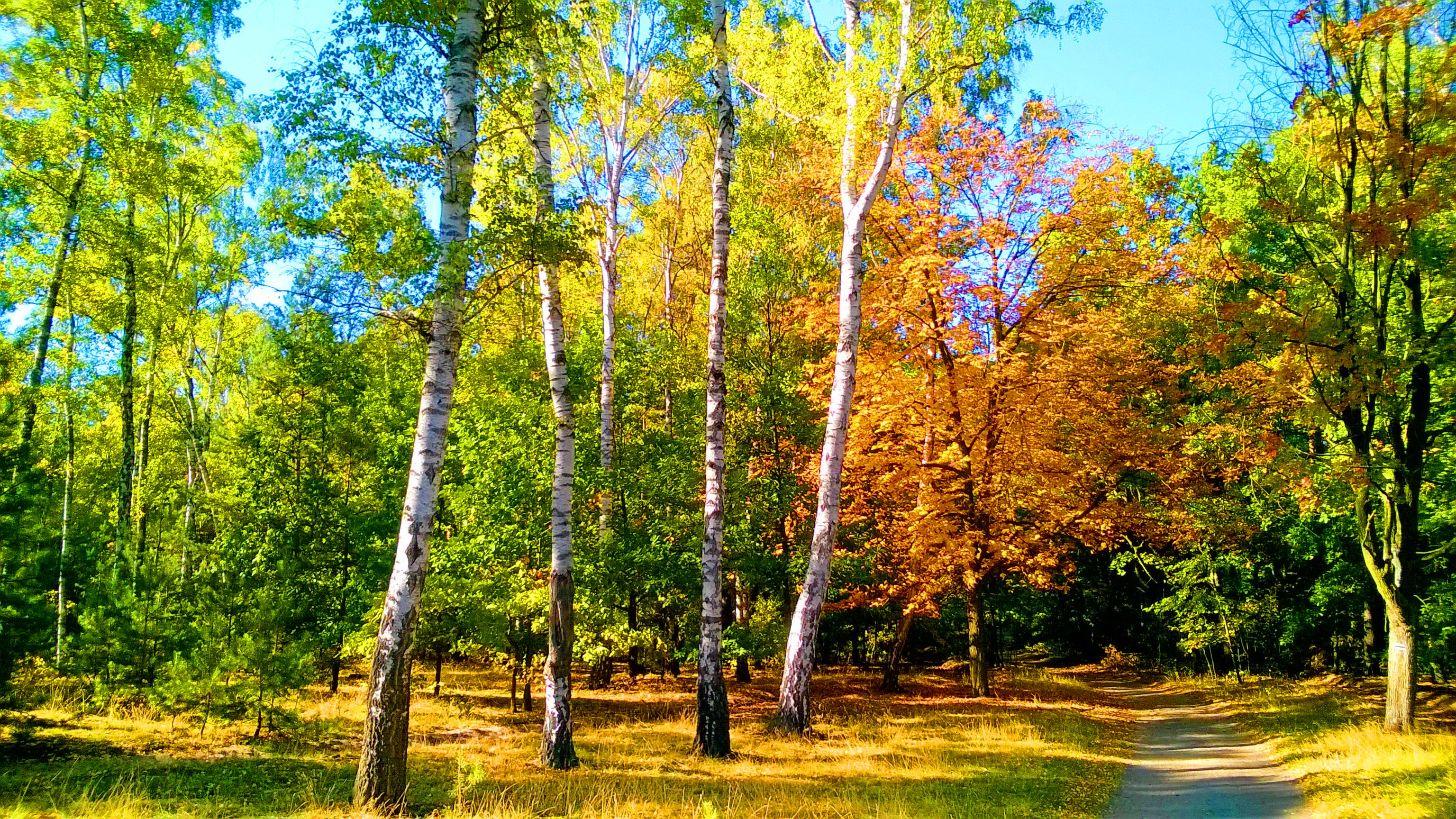 Las Barbarka w Toruniu12